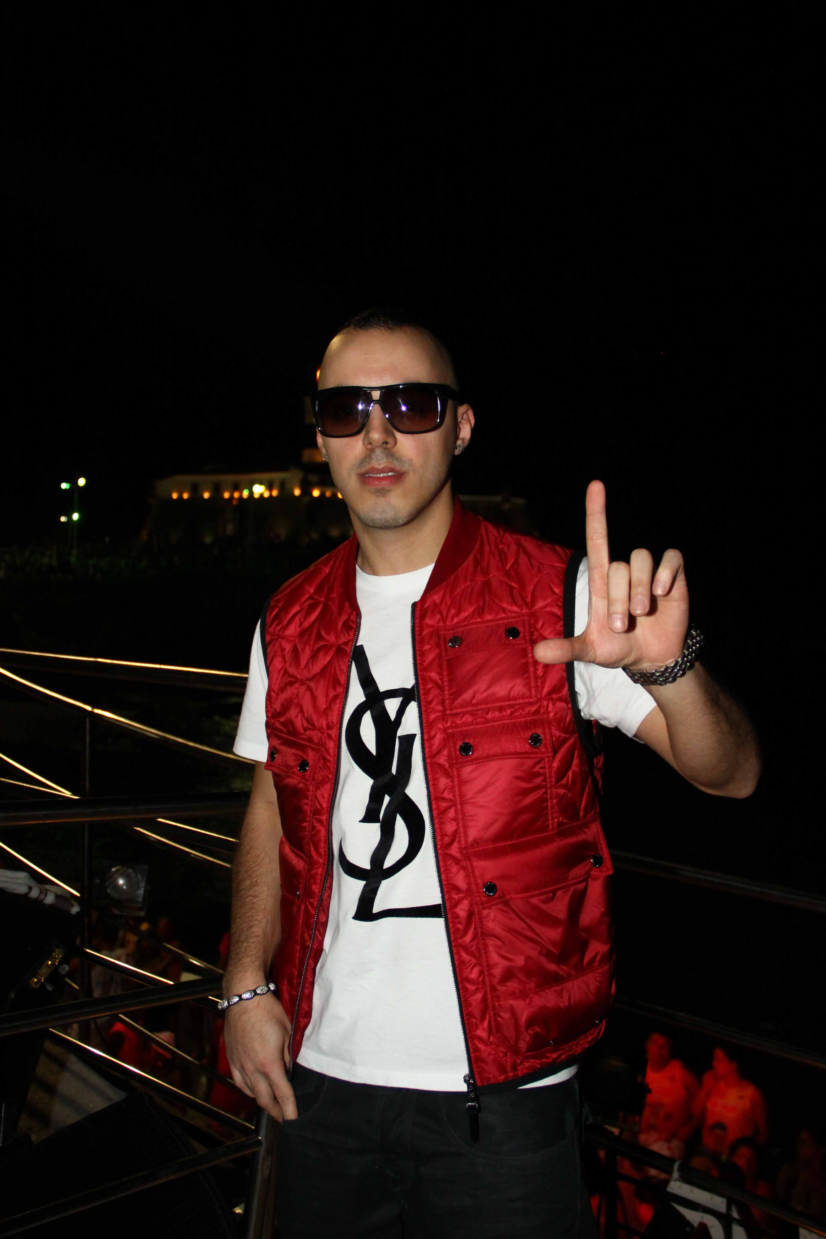 Cantor Lucenzo no carnaval da Bahia em 2012